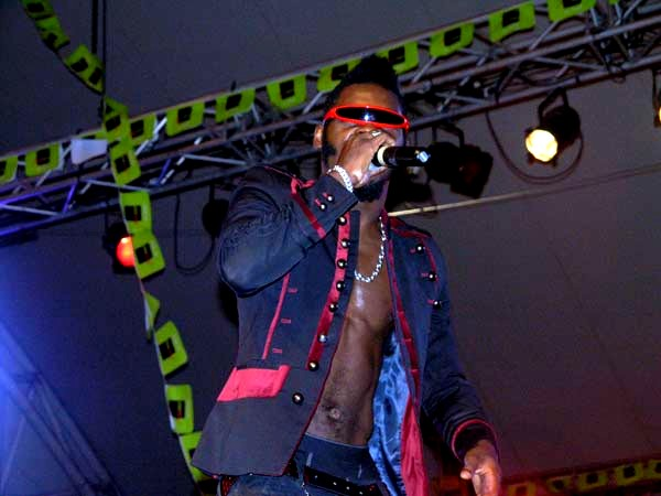 l'artiste Dj Arafat